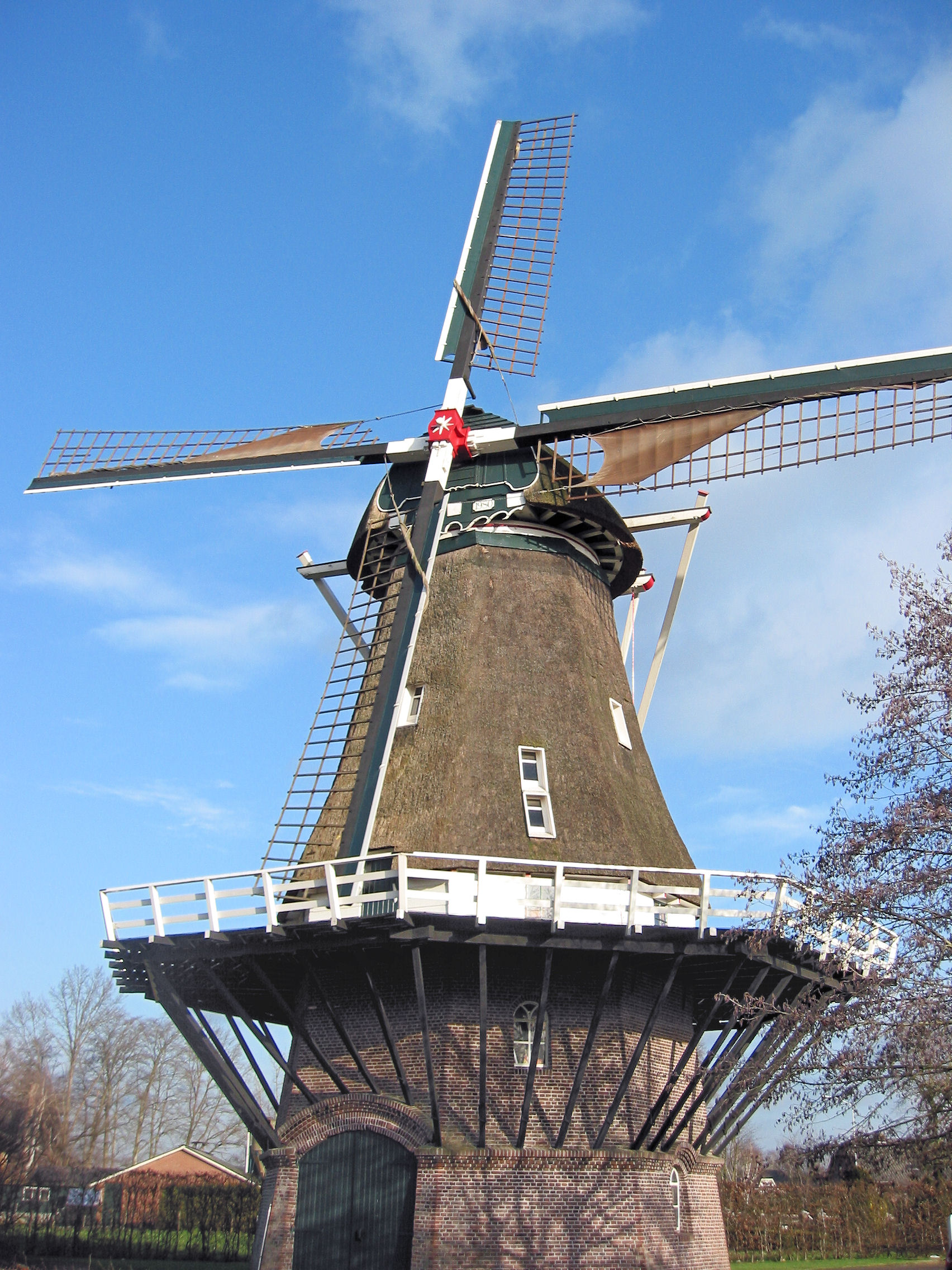 Walderveense molen 2 hoge lijnen